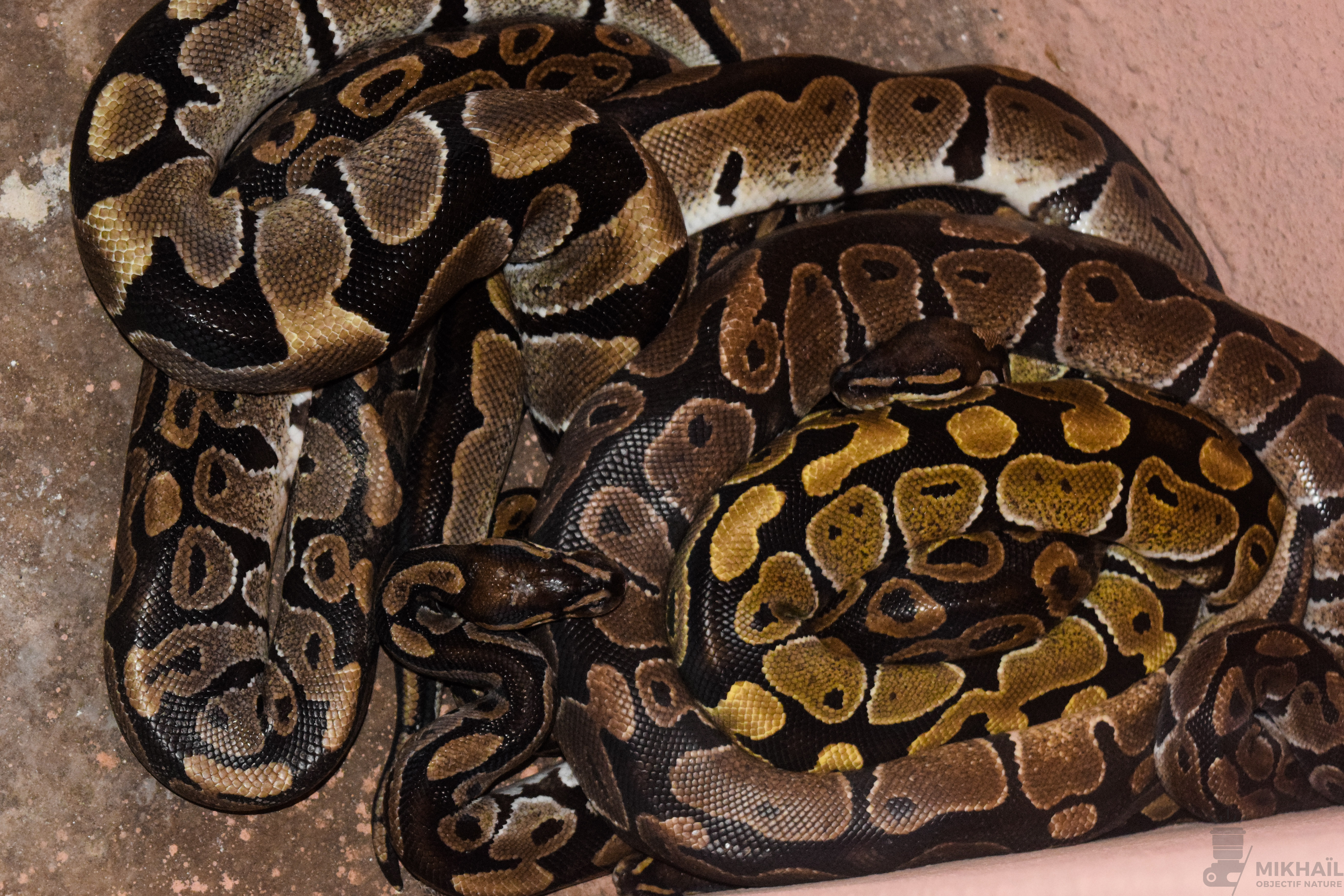 Python royal au temple des python à Ouidah